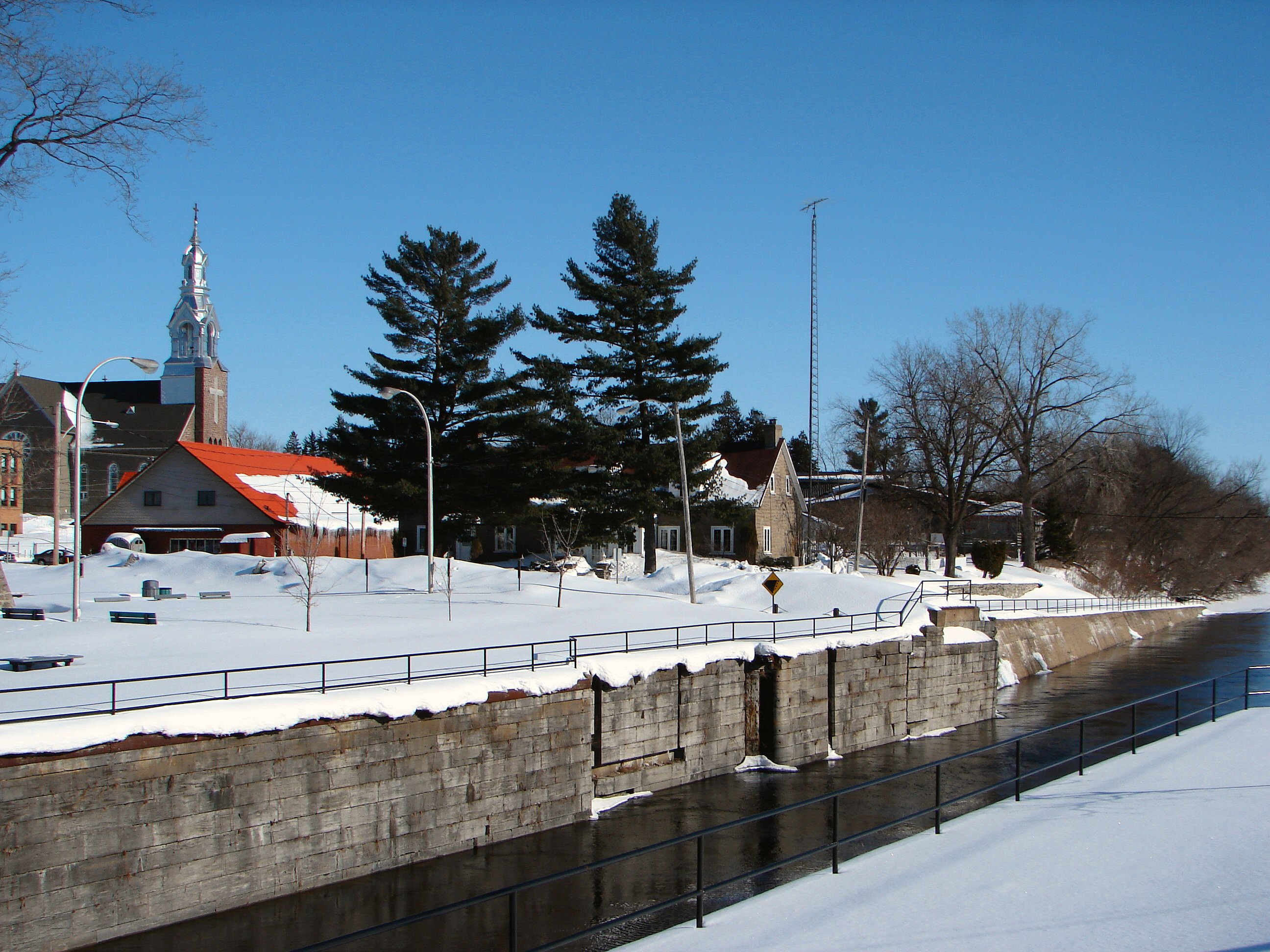 Grenville-sur-la-Rouge, Quebec, Canada